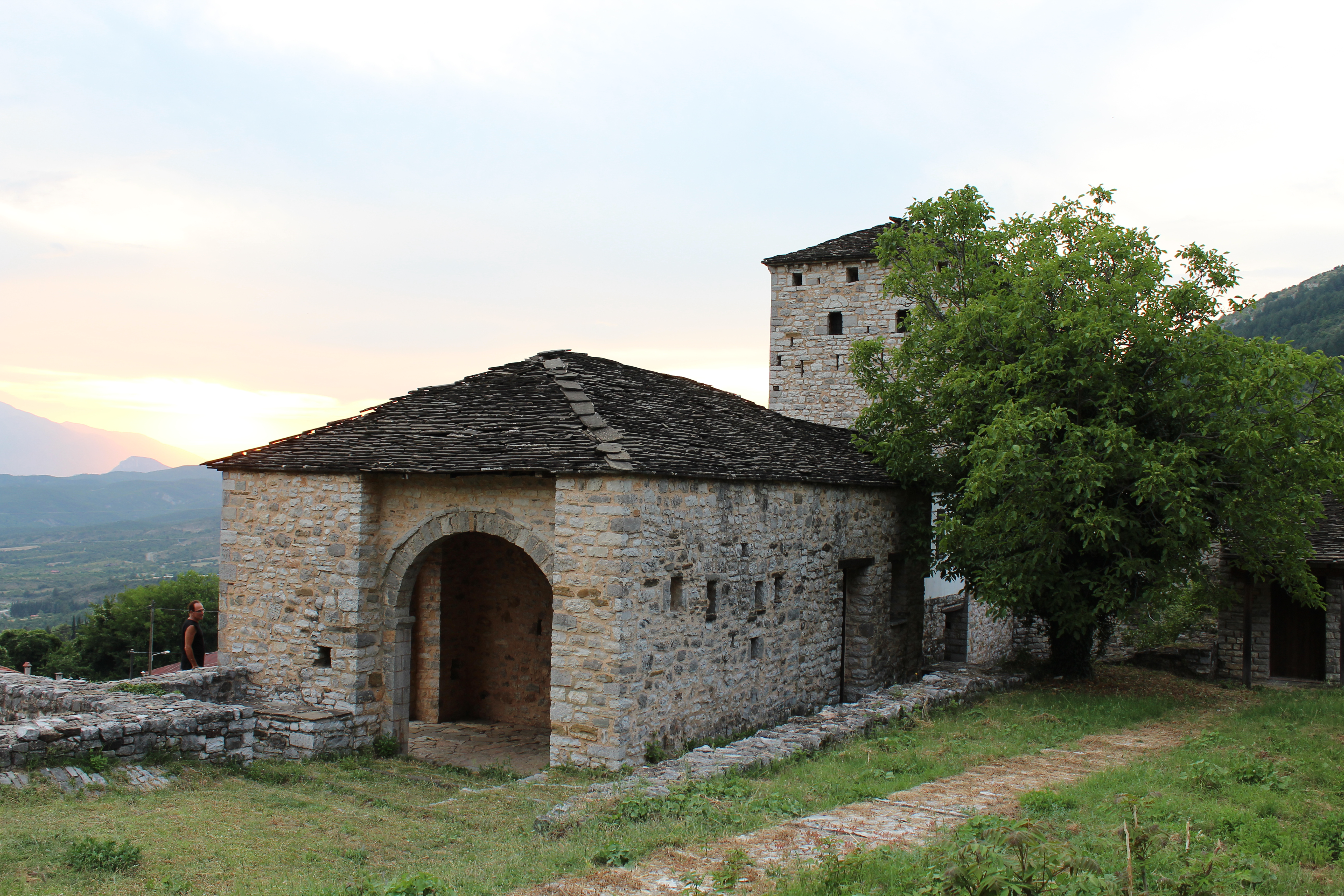 Οικιστικό συγκρότημα Χάμκως«Οικιστικό συγκρότημα Χάμκως»